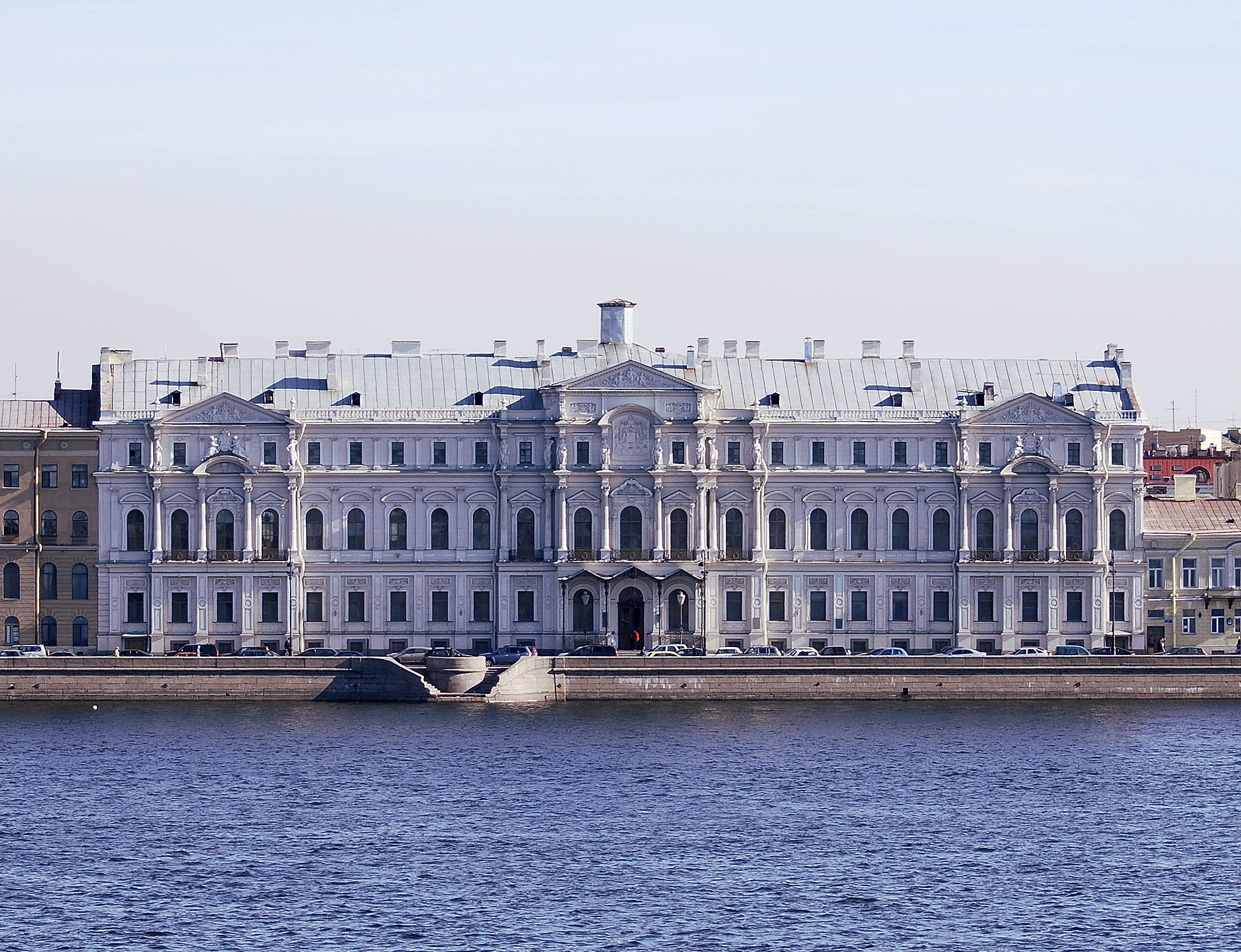 Ново-Михайловский дворец в приближении.